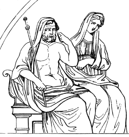 Greek God Hades